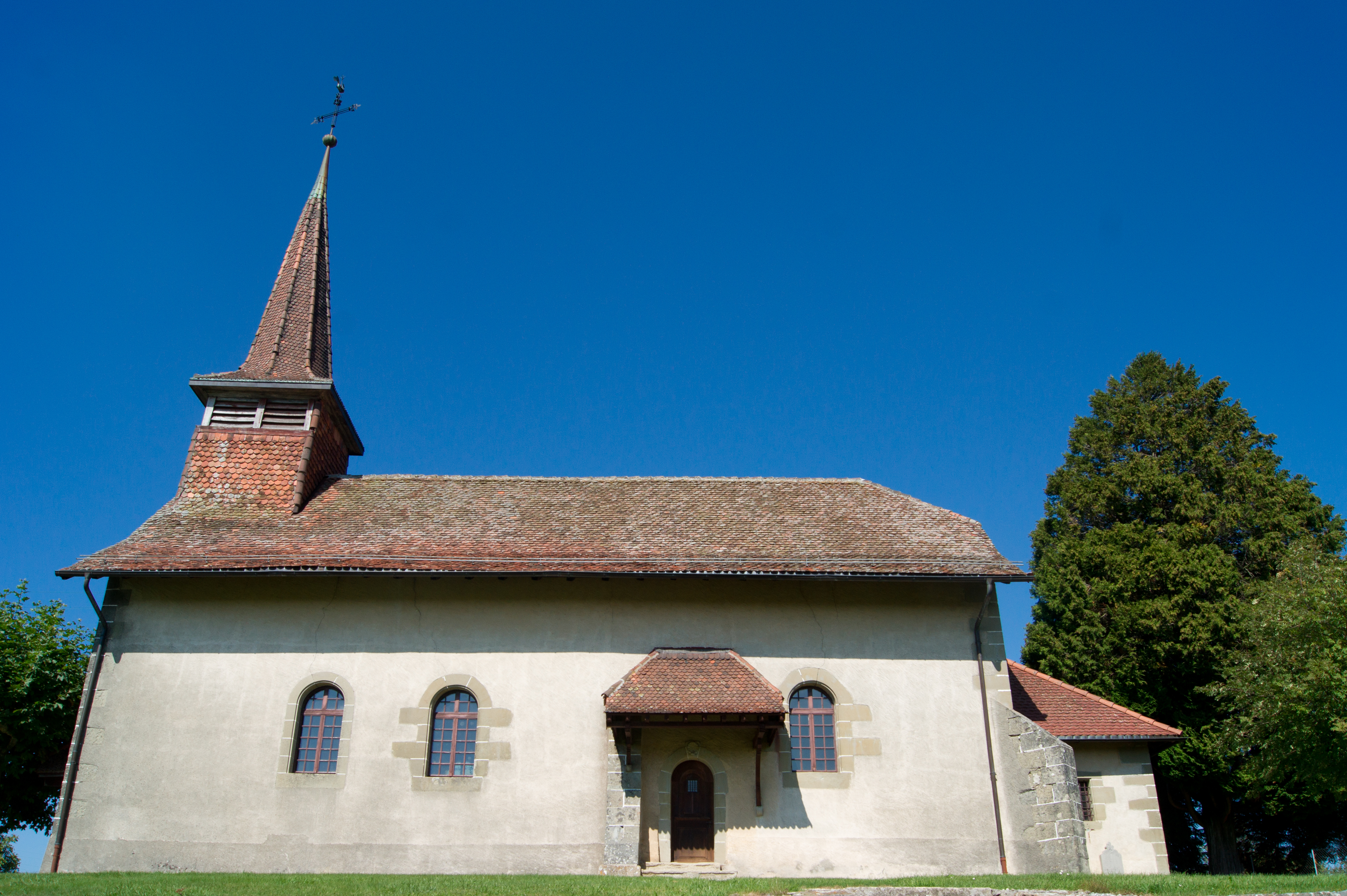 Chapelle à Bottens, canton de Vaud, Suisse.